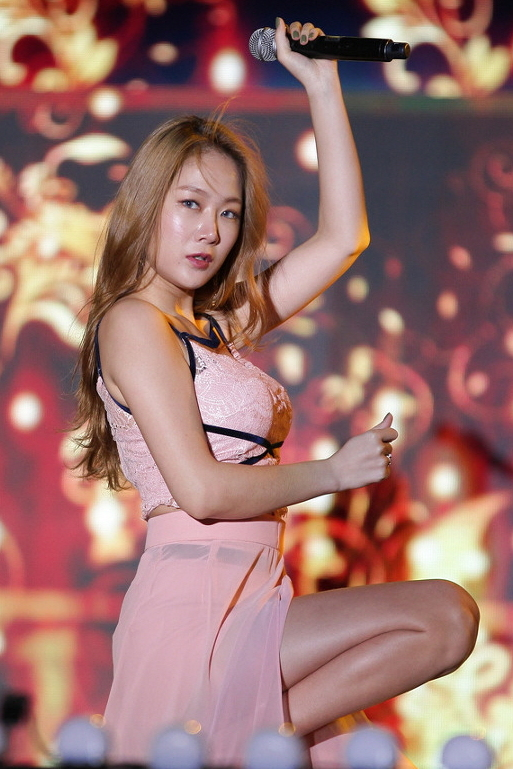 씨스타(SISTAR) G페스티벌 아시아 드림 콘서트